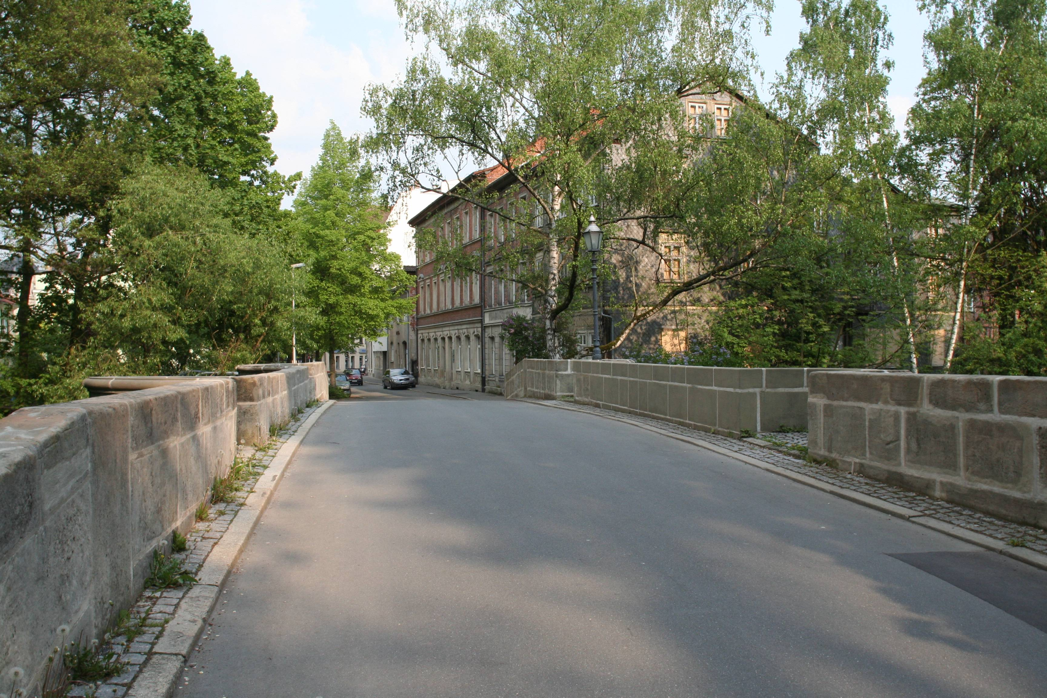 Coburg, Judenbrücke über die Itz